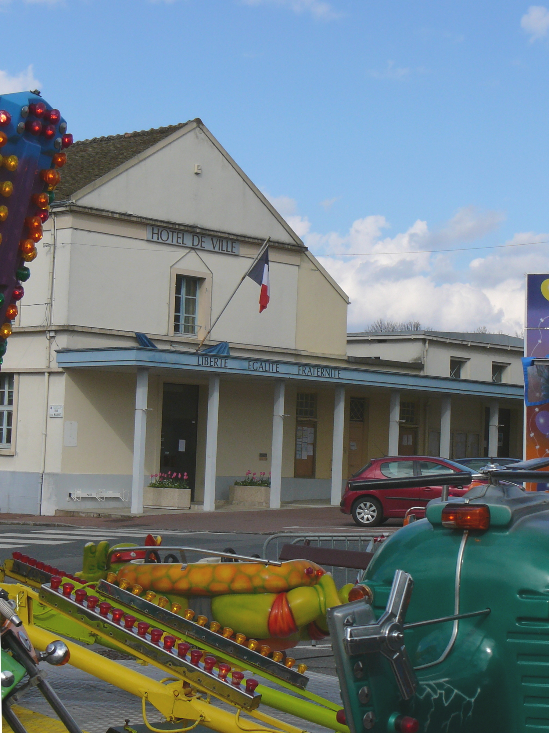 Mairie de Ballancourt-sur-essonne